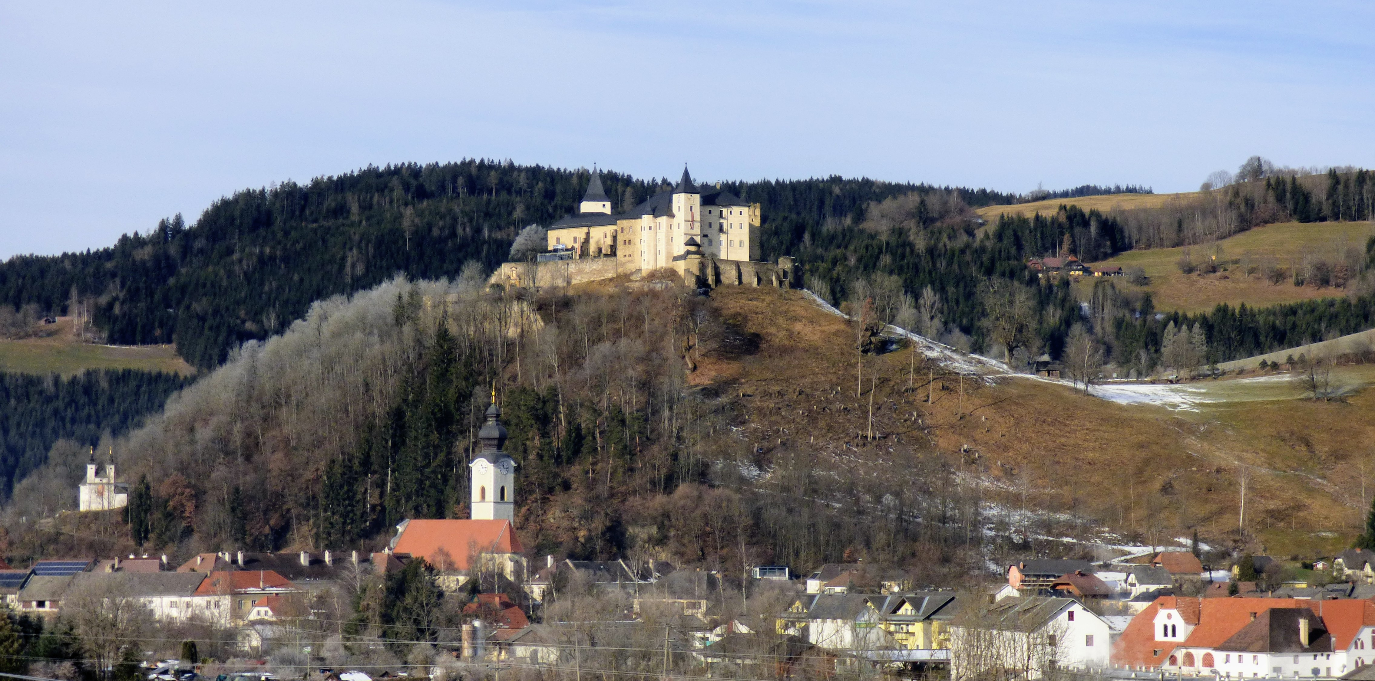 Straßburg in Kärnten